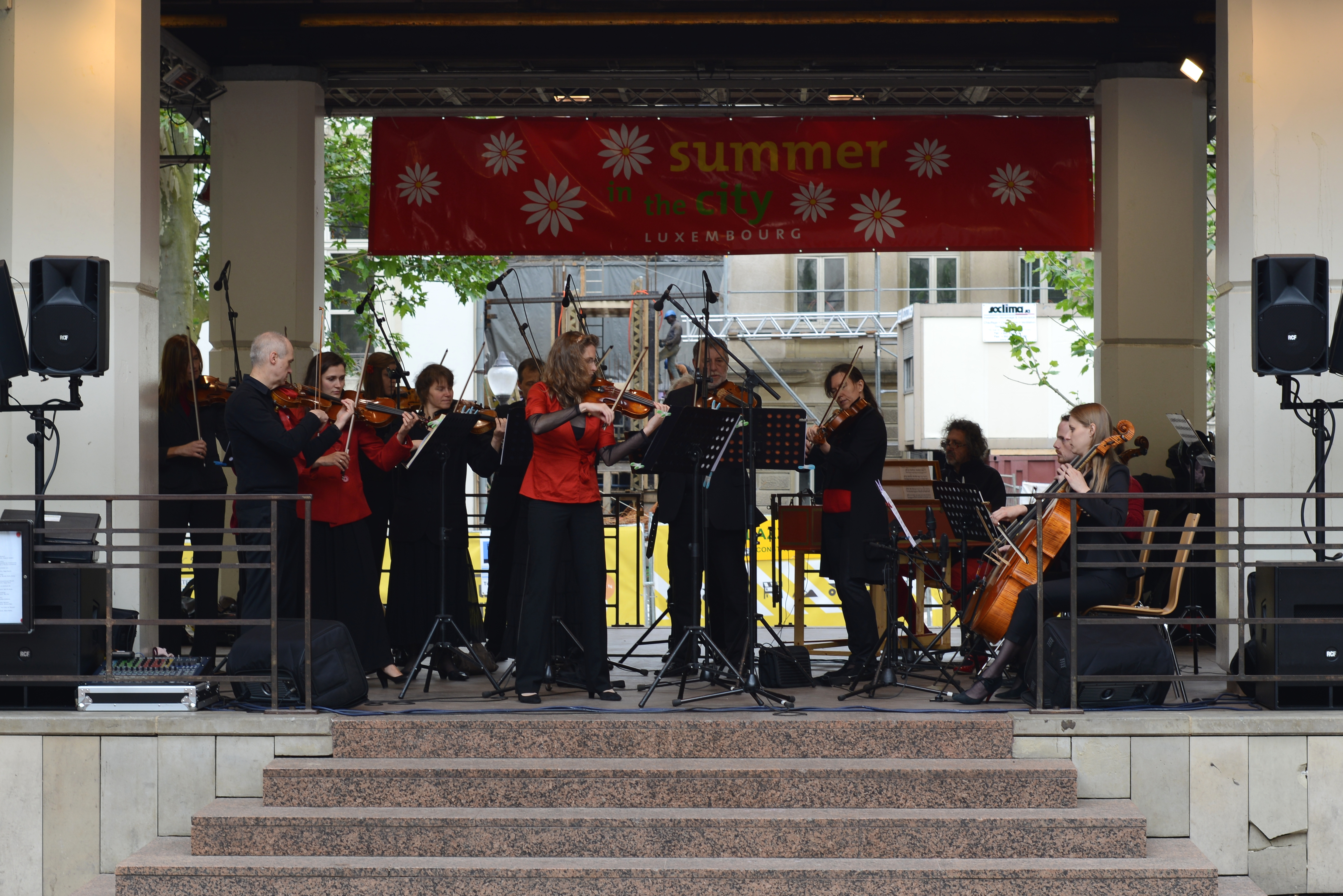 E Concert vum Ensemble Estro Armonico op der Plëss.